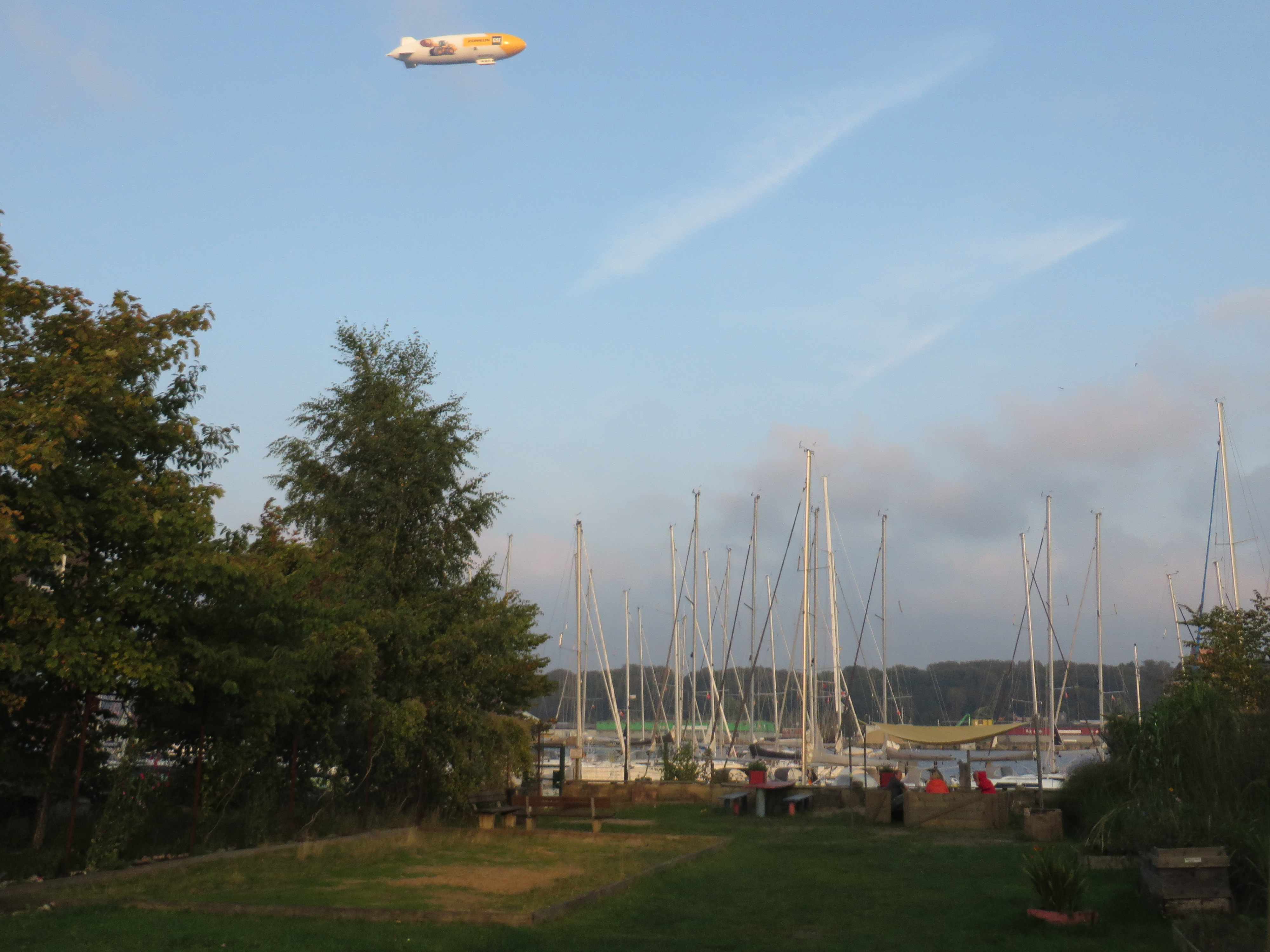 Zeppelin NT (Zeppelin CAT) von Flensburg-Schäferhaus kommend bei Galwik, 2017, Bild 04